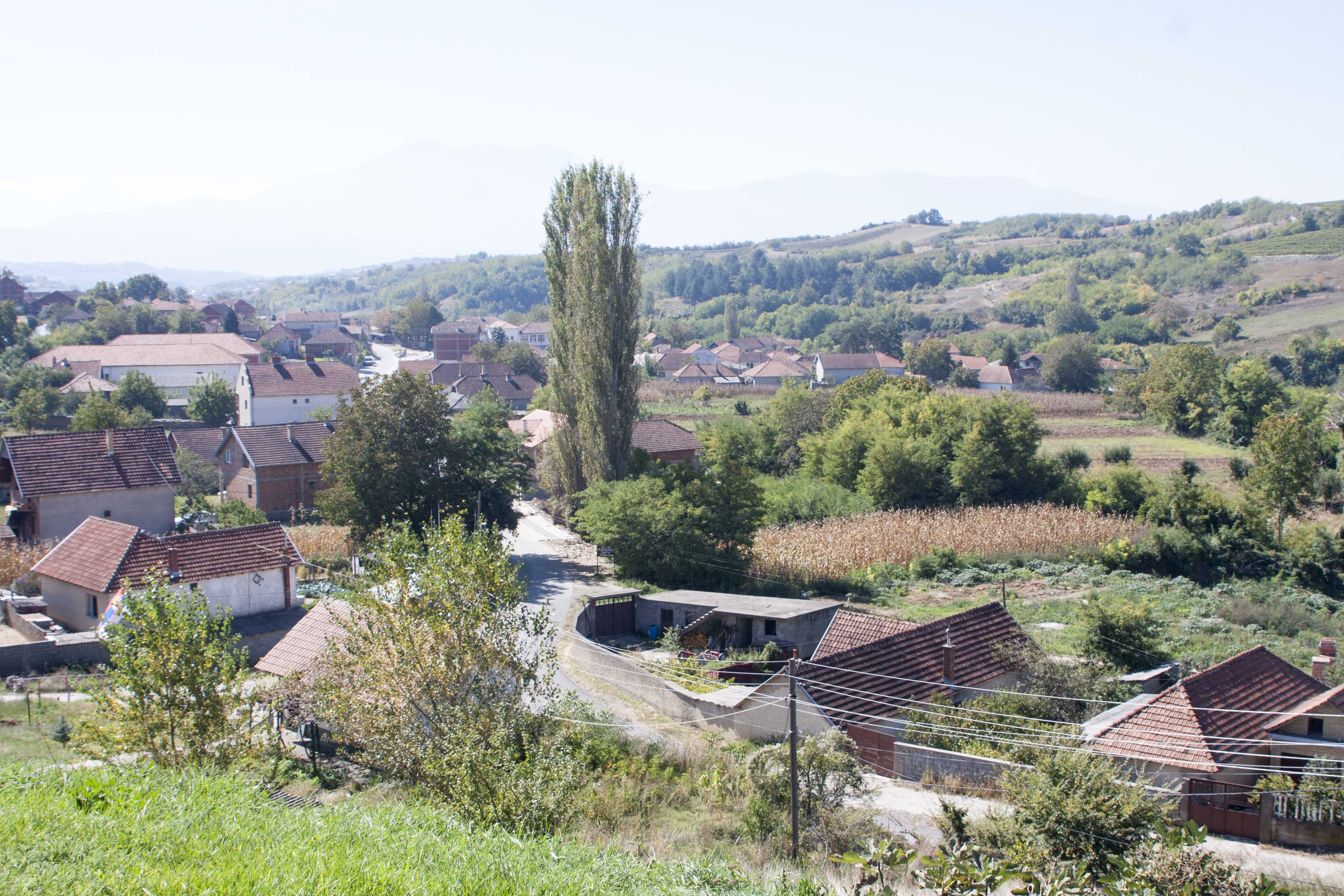 Fshati Hoqë e madhe